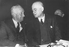 מימין לשמאל: ד"ר אריה אלטמן ו וד"ר יצחק דוד בוקשפן, חברי התנועה הרוויזיוניסטית